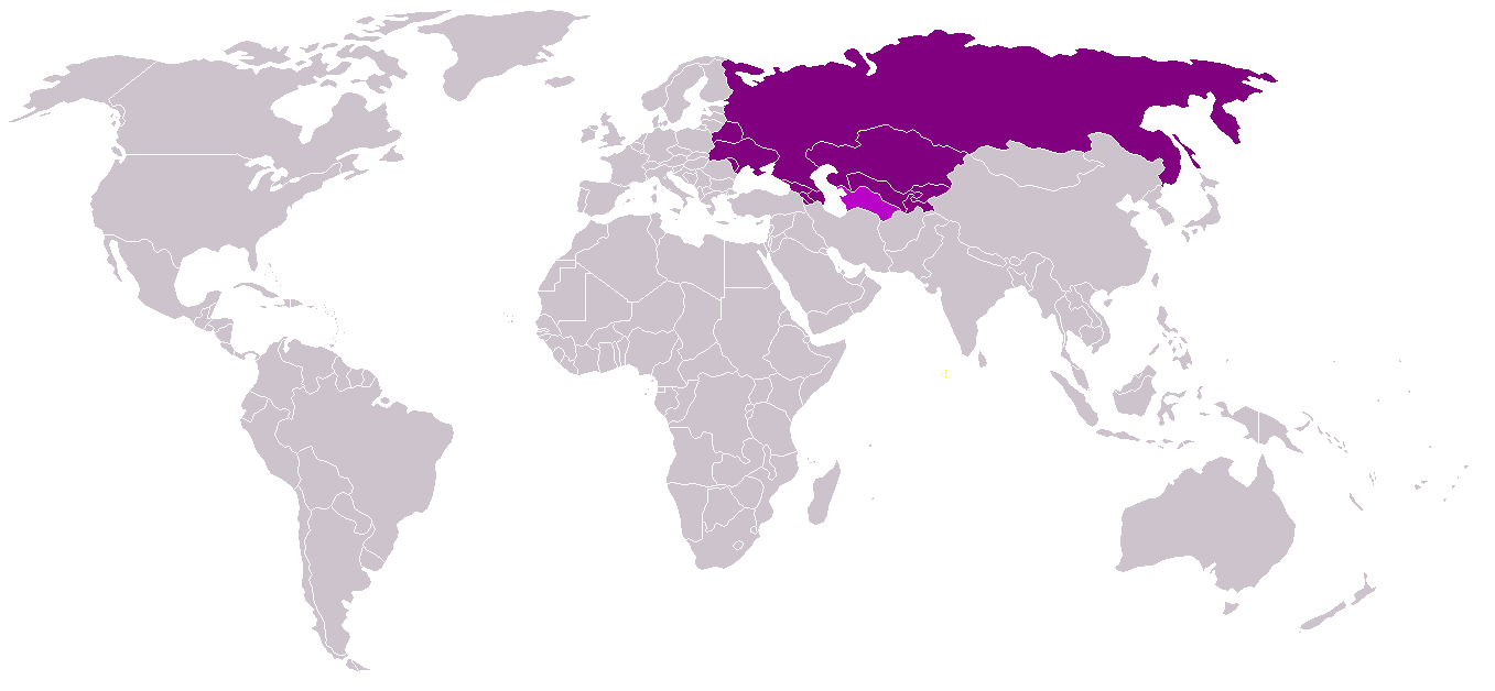 Legenda: Roxo: Estados Membros Rosa: Estados Observadores